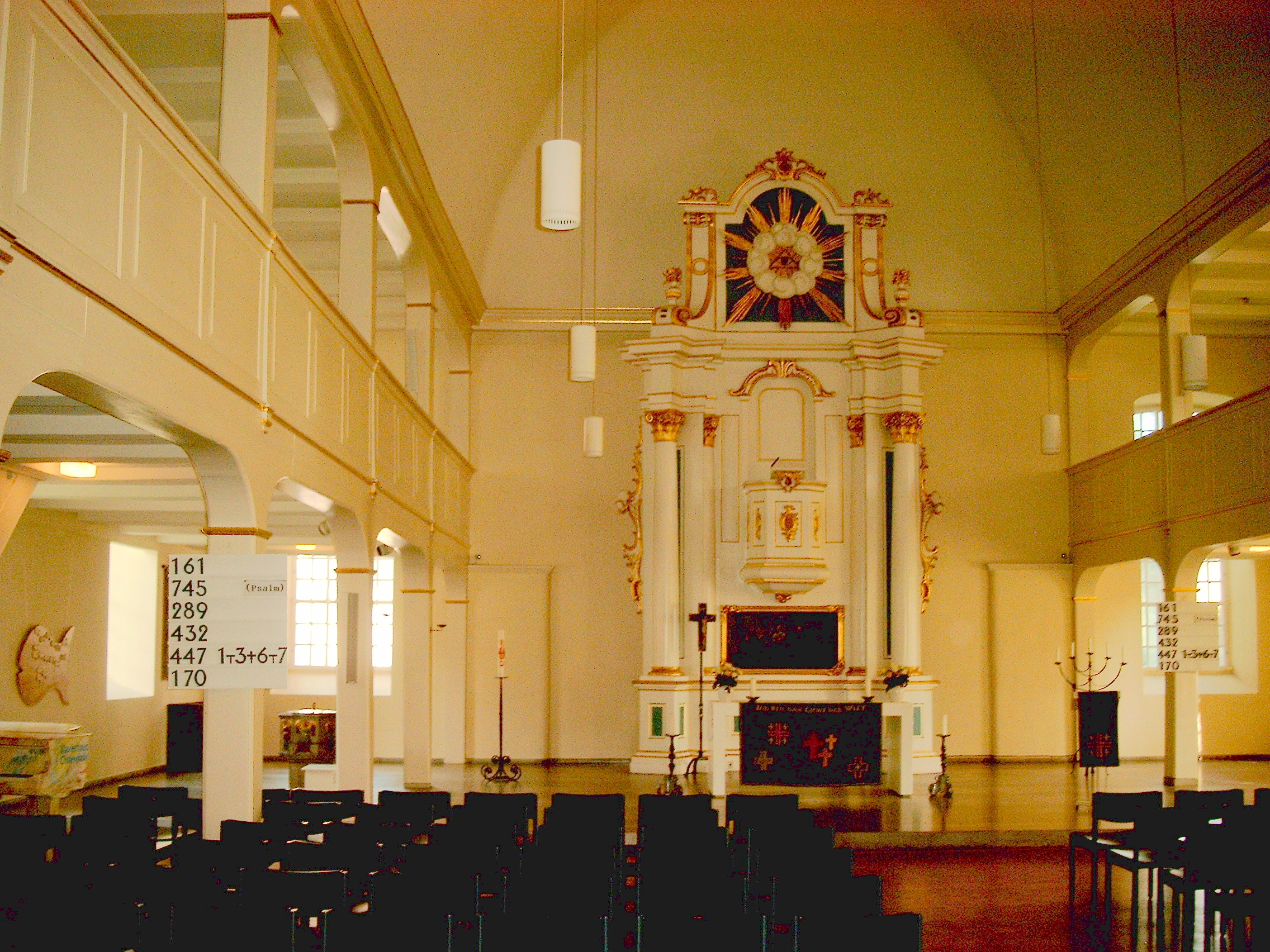 Ev. luth. Kirche St Martin in Seelze, Innenraum mit Altarwand und Taufstein